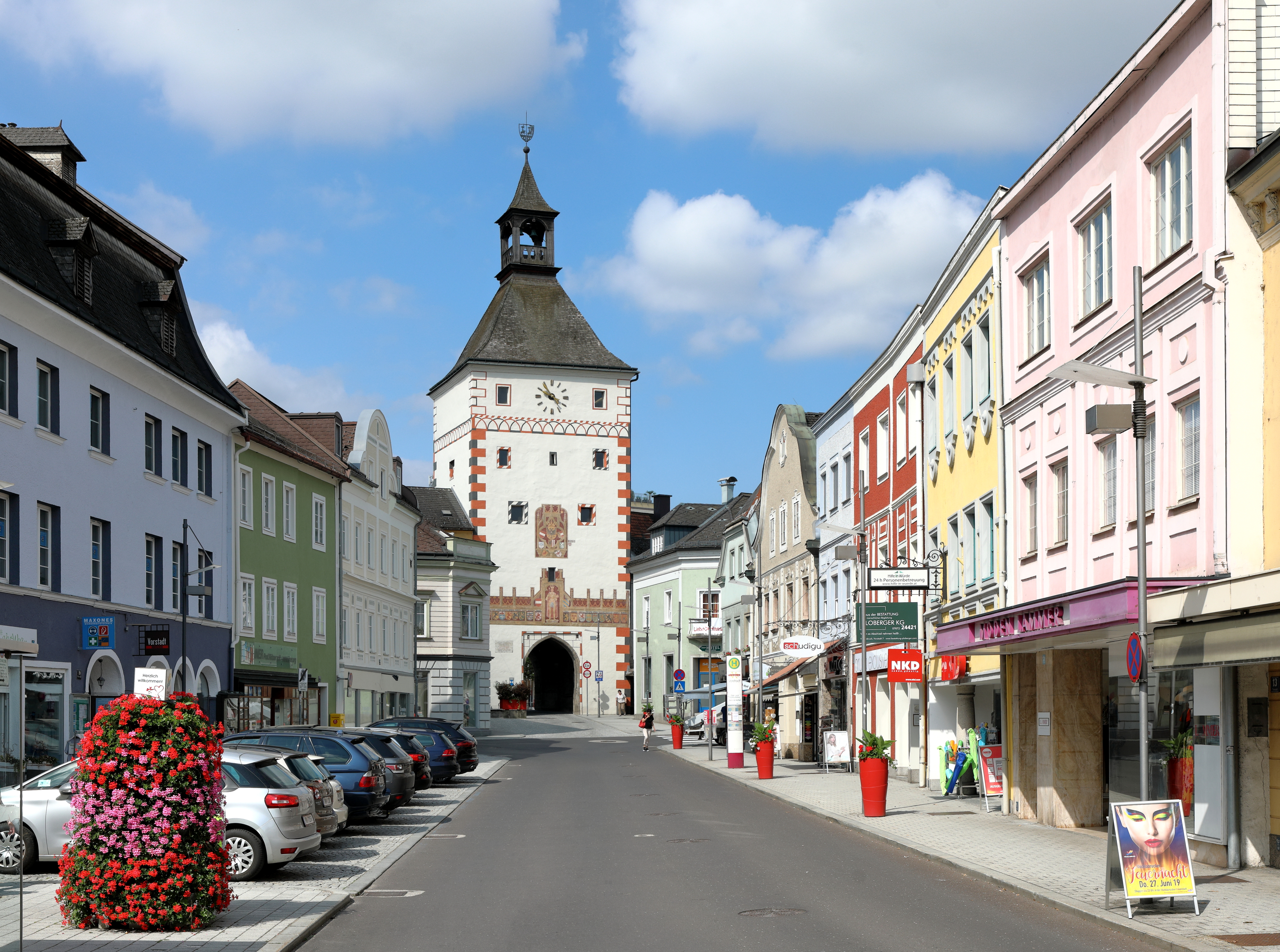 Die „Vorstadt“ und der untere Stadtturm der oberösterreichischen Stadt Vöcklabruck. Der Stadtturm wurden im 14./15. Jahrhundert erbaut, 1580 um ein Geschoss erhöht und mit einer Turmlaterne versehen. Er schließt den Stadtplatz Richtung Osten ab.